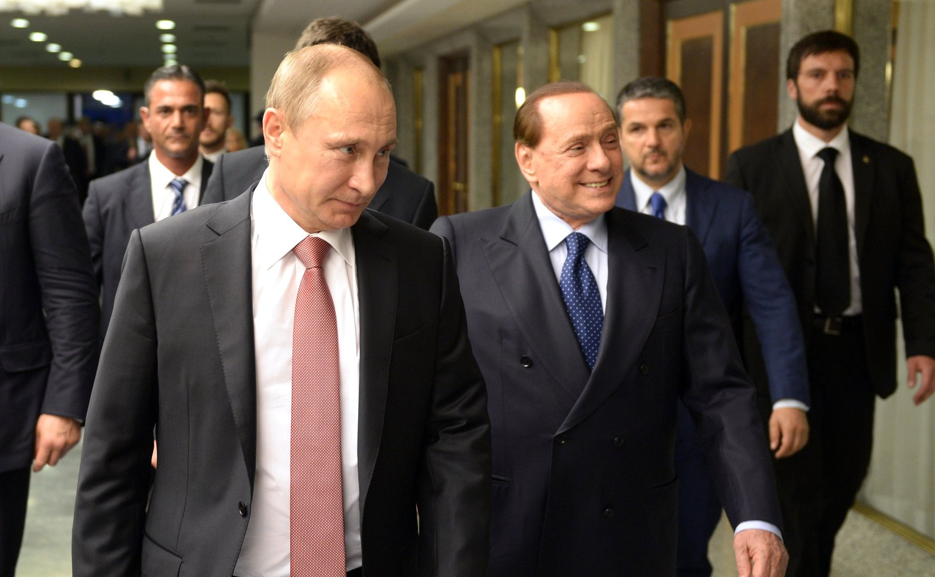 Встреча Владимира Путина с Сильвио Берлускони